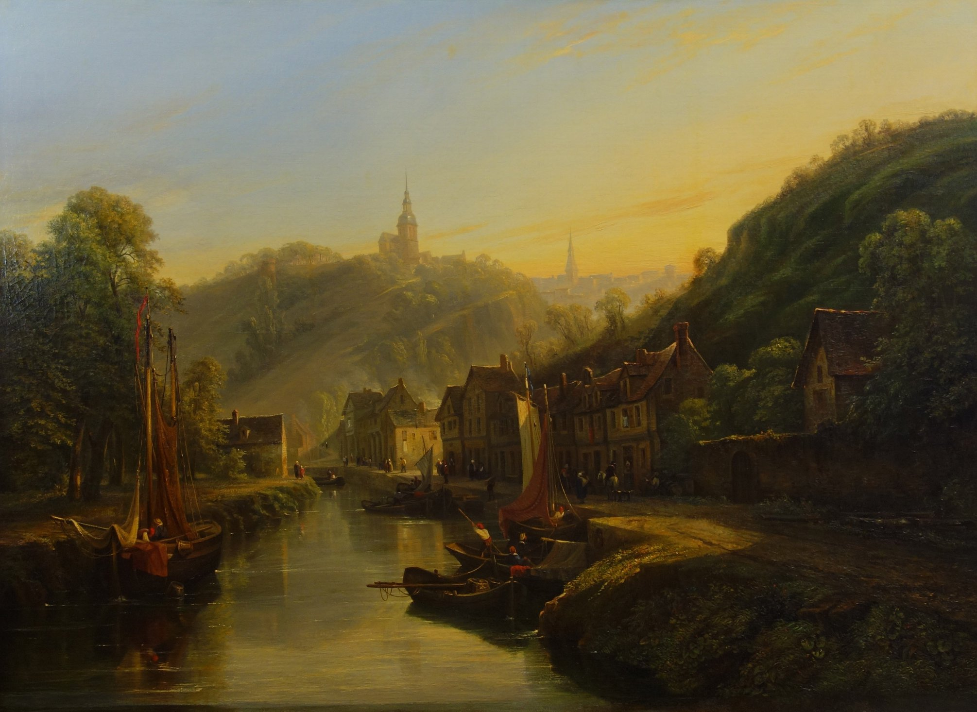 Le port de Dinan par Isidore Dagnan (vers 1835), coll. Ville de Dinan - Musée de Dinan